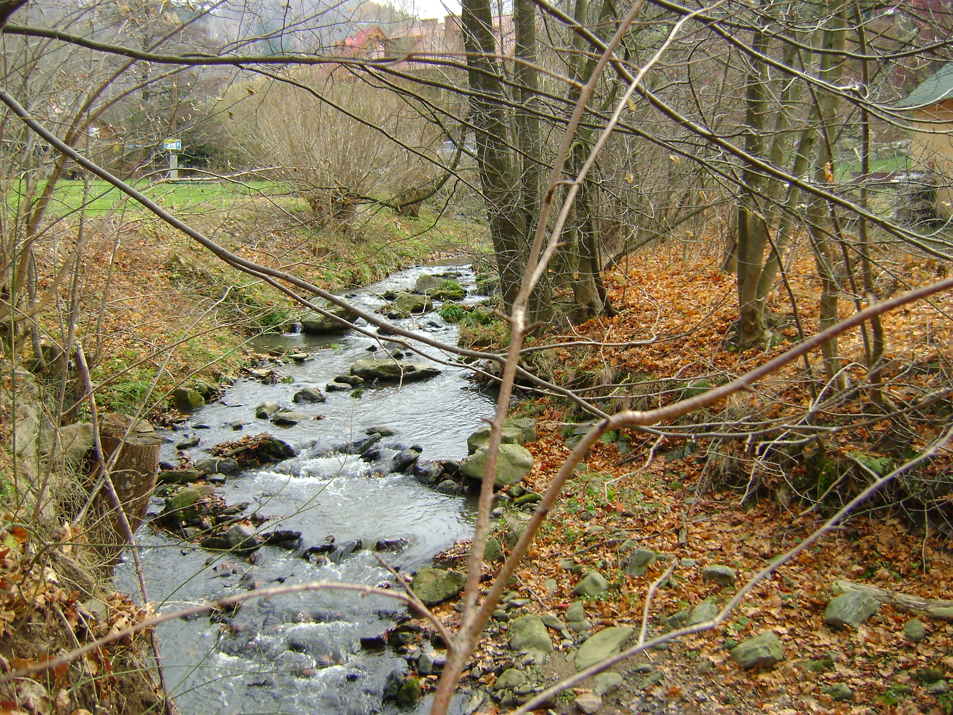 Młynówka – potok górski w Sudetach Zachodnich, w Górach Sowich, w woj. dolnośląskim. Widok potoku przed Michałowem około 500m. przed ujściem do Jeziora Bystrzyckiego